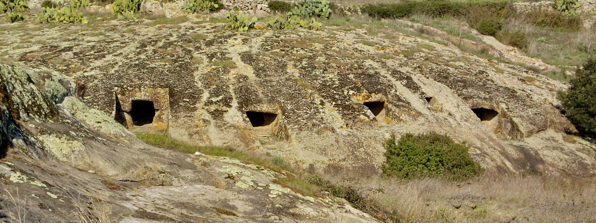 Necropoli a Domus de Janas di Genna Salixi - MIBAC This is a photo of a monument which is part of cultural heritage of Italy.